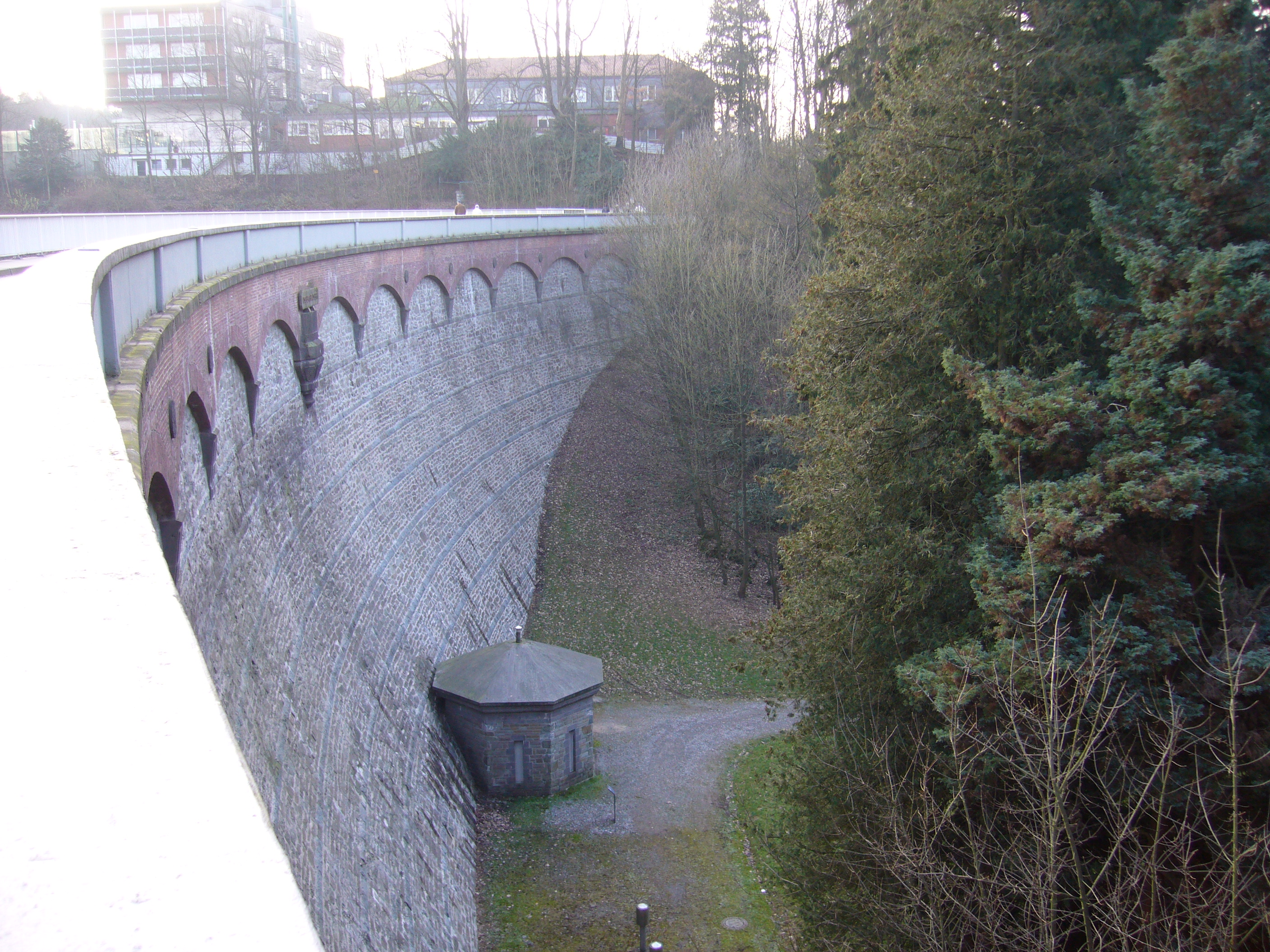 Eschbachtalsperre